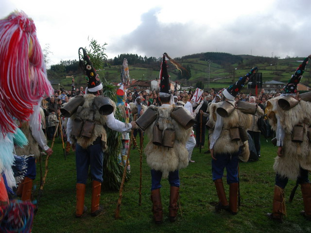 Fiesta de La Vijanera en Silió. Fiesta de La Vijanera en Silió © jlgomezlinares